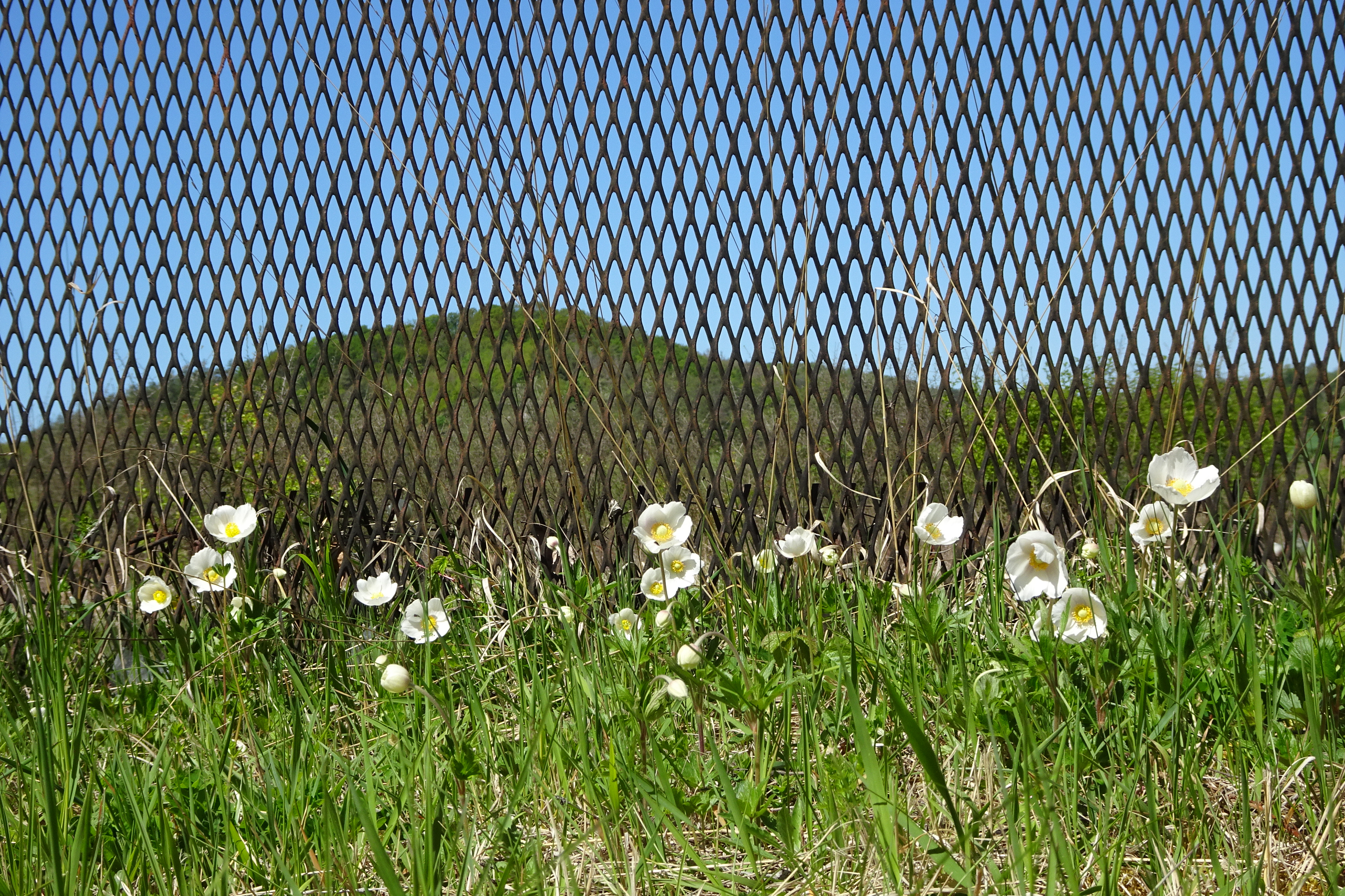 Das „Baumkreuz bei Ifta“ wurde am 16. und 17. November 1990 mit 140 Bäumen auf der ehemaligen deutsch-deutschen Grenze, als „Start-Skulptur“, für eine West und Ost verbindende Allee zwischen Kassel und Eisenach gepflanzt. Das Baumkreuz besteht aus einer Eschenallee auf dem früheren Grenzstreifen, die eine Lindenallee entlang der Bundesstraße, die Thüringen mit Hessen verbindet, kreuzt. Zwischen den drei Eschenreihen steht der Grenzzaun, einer der längsten noch original erhaltenen Teile in Deutschland. Die „Aktion Baumkreuz“ knüpfte an den „Erweiterten Kunstbegriff“ von Joseph Beuys an, den dieser mit dem Projekt „7000 Eichen“ in Kassel verbunden hatte. Seit 1990 kommen jedes Jahr im November Menschen aus ganz Deutschland und helfen mit, das Projekt fortzupflanzen. Es ist mittlerweile auf mehr als eintausend Bäume angewachsen. Getragen wurde die Aktion bis 2014 von dem inzwischen gelöschten „Unternehmen Wirtschaft und Kunst – erweitert“, danach vom BUND Thüringen. Angelegt wurde das Baumkreuz dort, wo die Bundesstraße 7 die thüringisch-hessische Landesgrenze durchquert. Der Bereich gehört zu der Gemarkung von Ifta, einem Stadtteil von Treffurt im westthüringischen Wartburgkreis und grenzt an die Gemarkung von Lüderbach, einem Ortsteil der Gemeinde Ringgau im nordhessischen Werra-Meißner-Kreis.